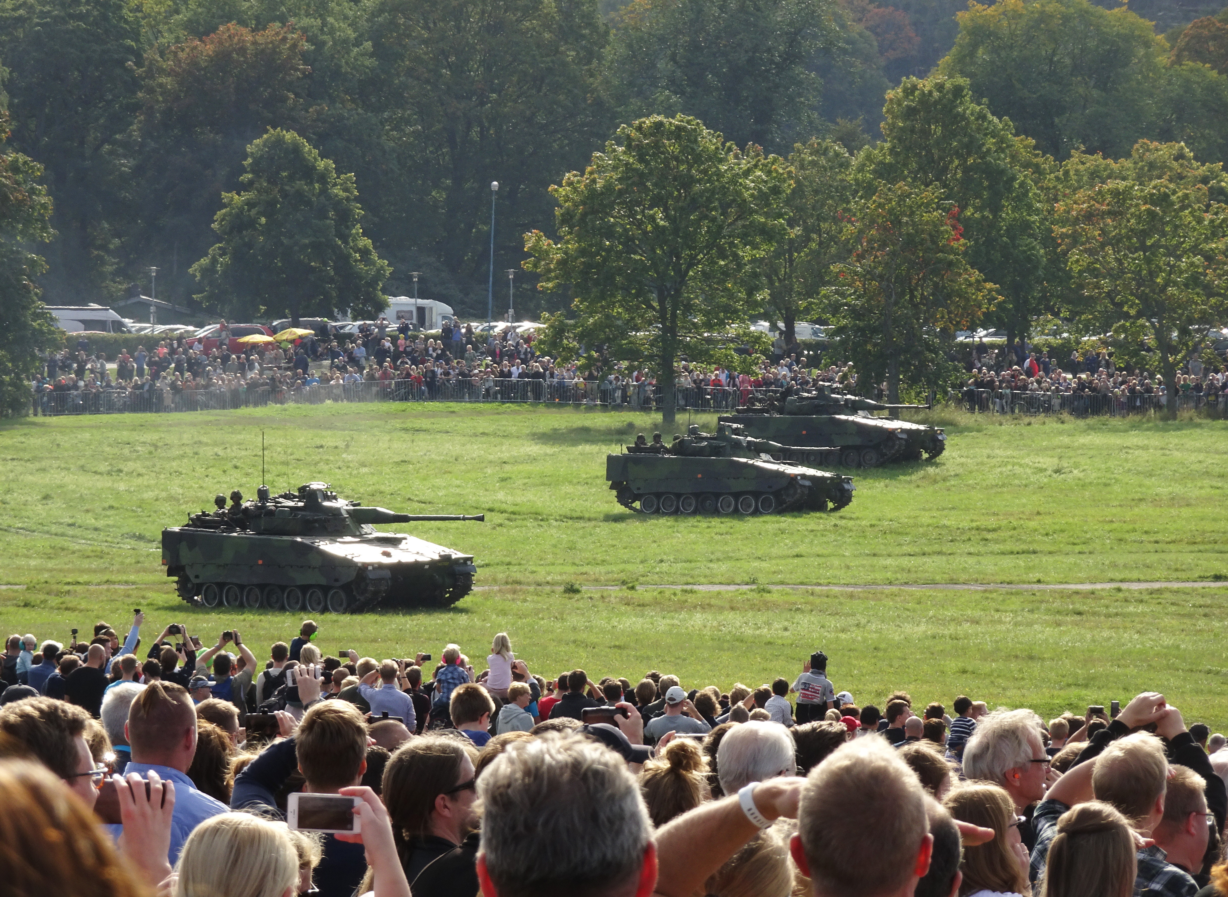 Aurora 17, Uppvisning och övning på Gärdet